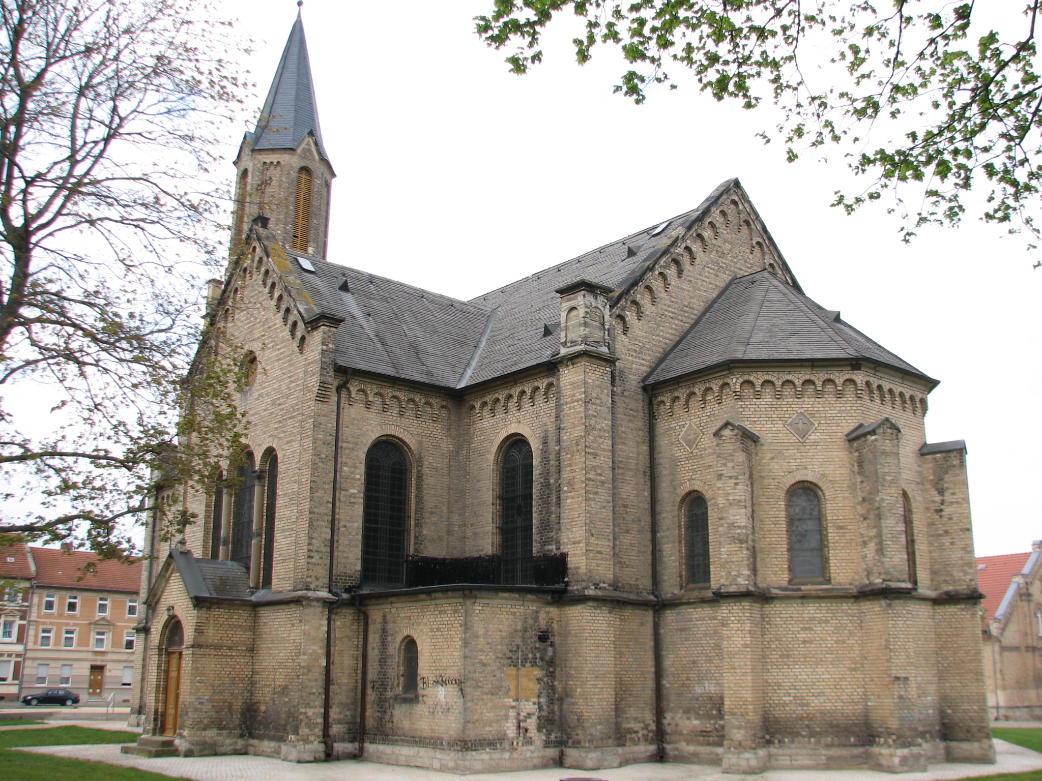 Kirche zu Leopoldshall, Foto vom April 2019